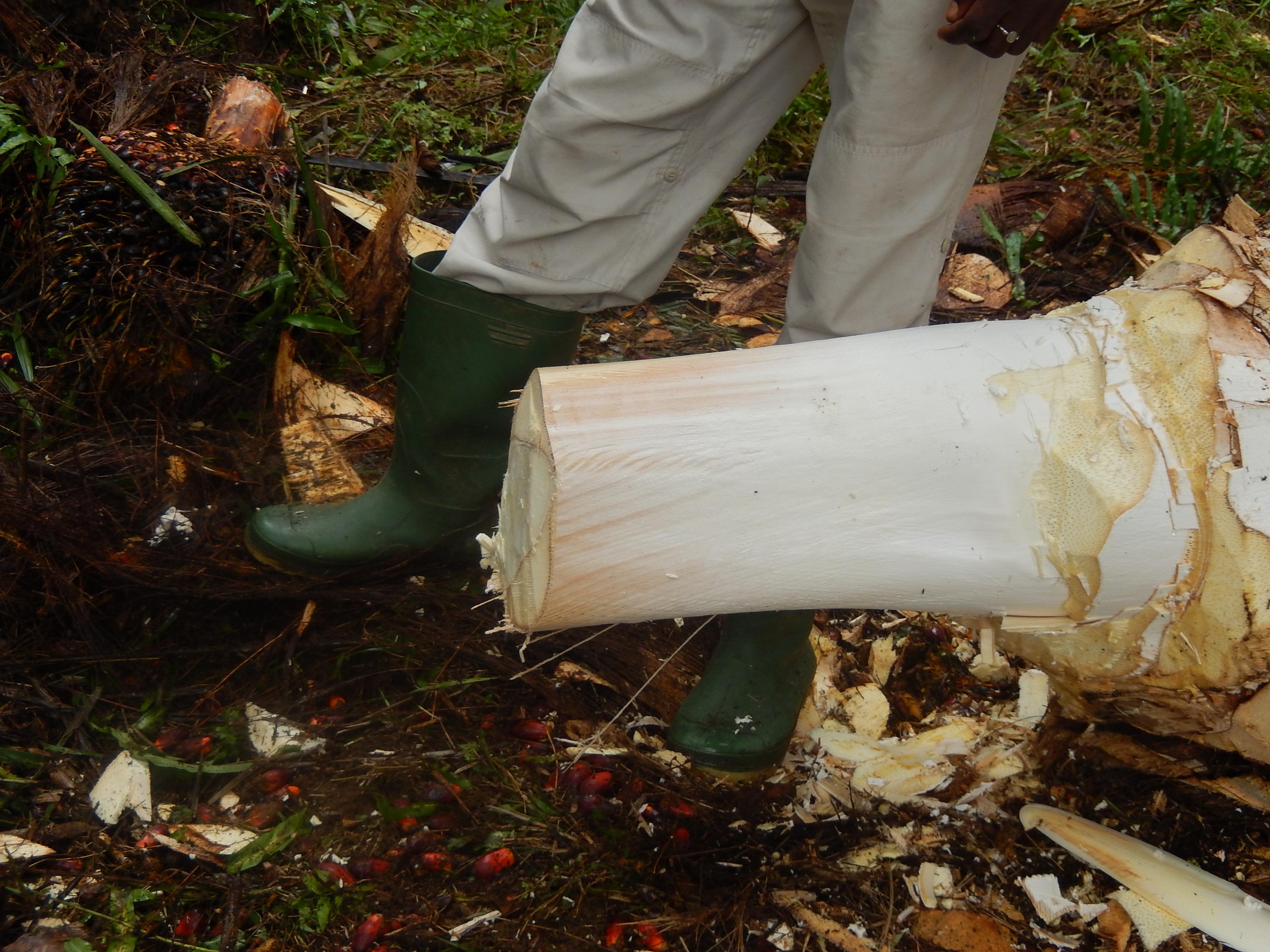 Récolte du vin de palme après abattage (Tayap, Cameroun).